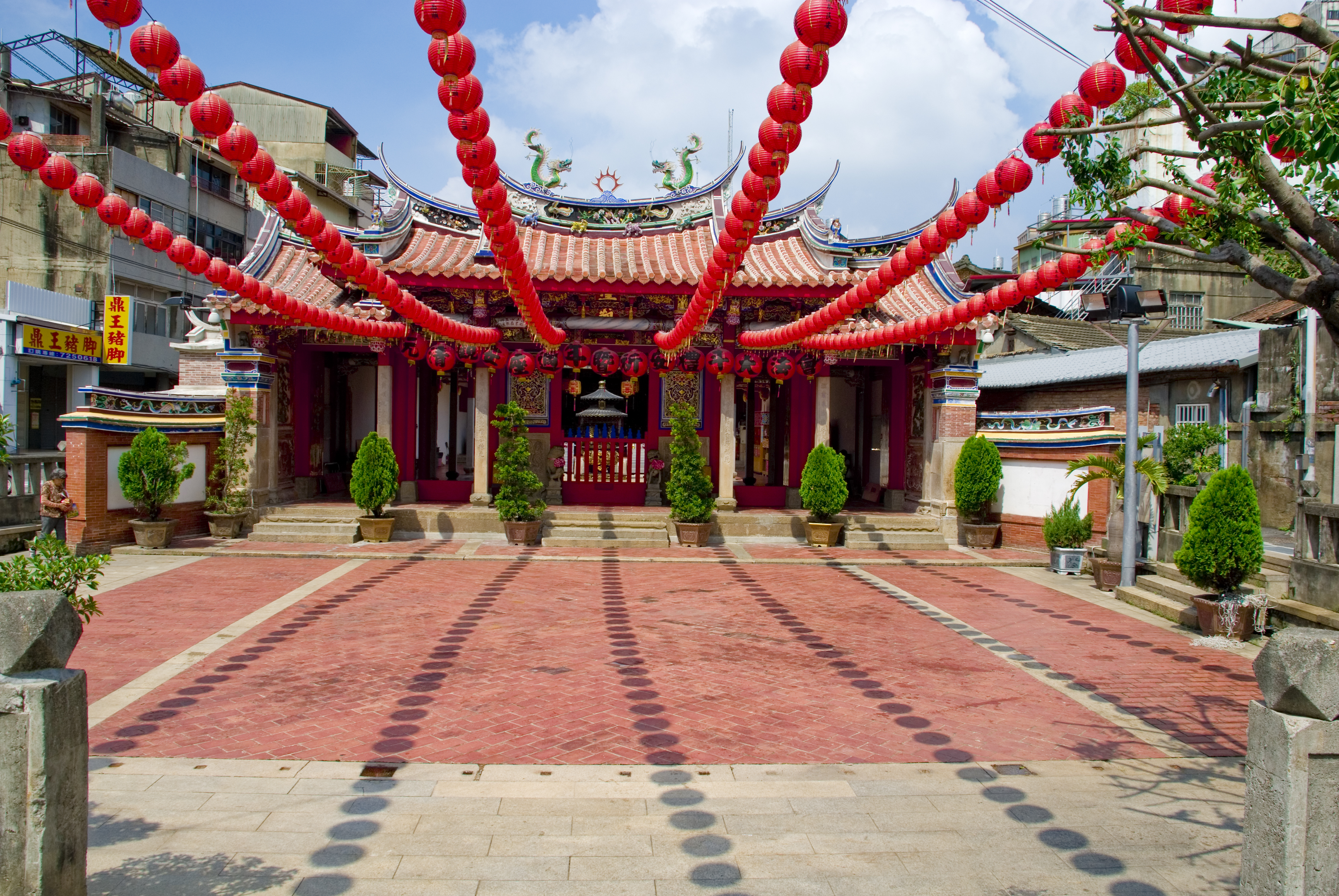 元清觀的建築屬磚木造殿堂式建築，其建築規模為五開間三進的建築格局，坐西朝東略偏北；三川殿前兩側有八字牆，正殿重簷高大，前後共三殿，三川殿後帶拜亭，正殿前亦置拜殿。